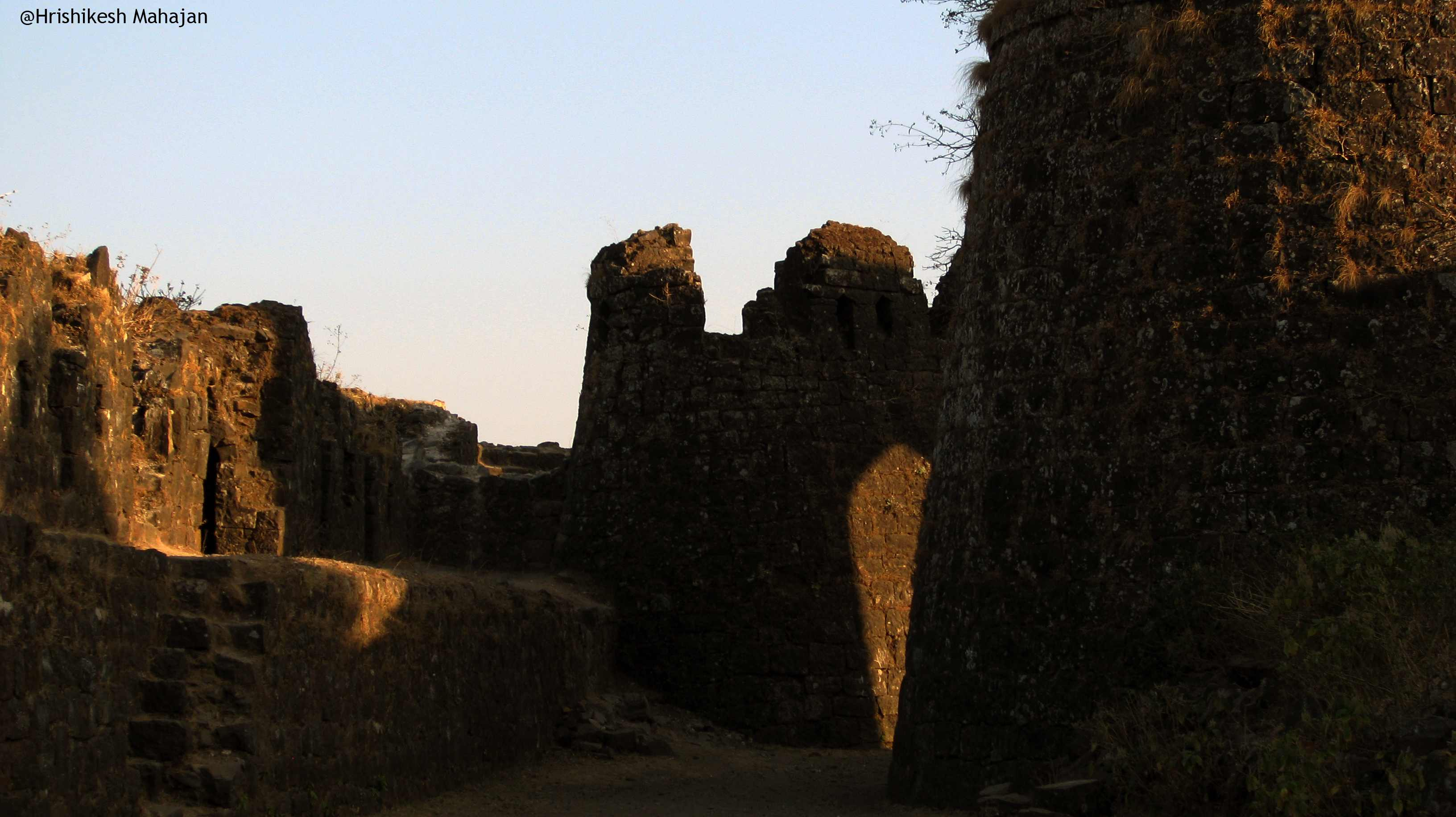 Inside Gawilgad fort, Maharashtra, India